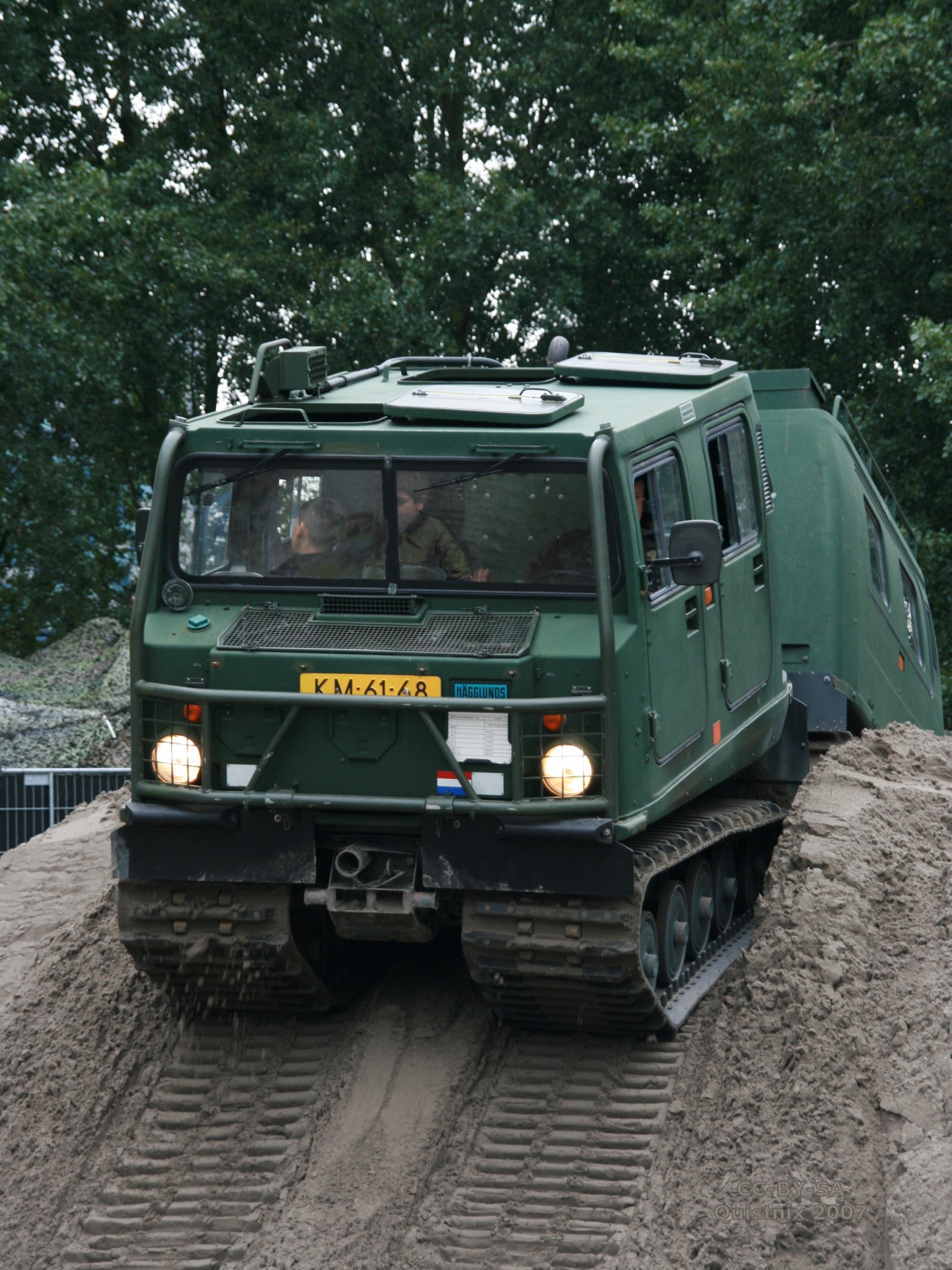 Hägglunds BV-206 Bandvagn van het Korps Mariniers tijdens de Wereldhavendagen 2007